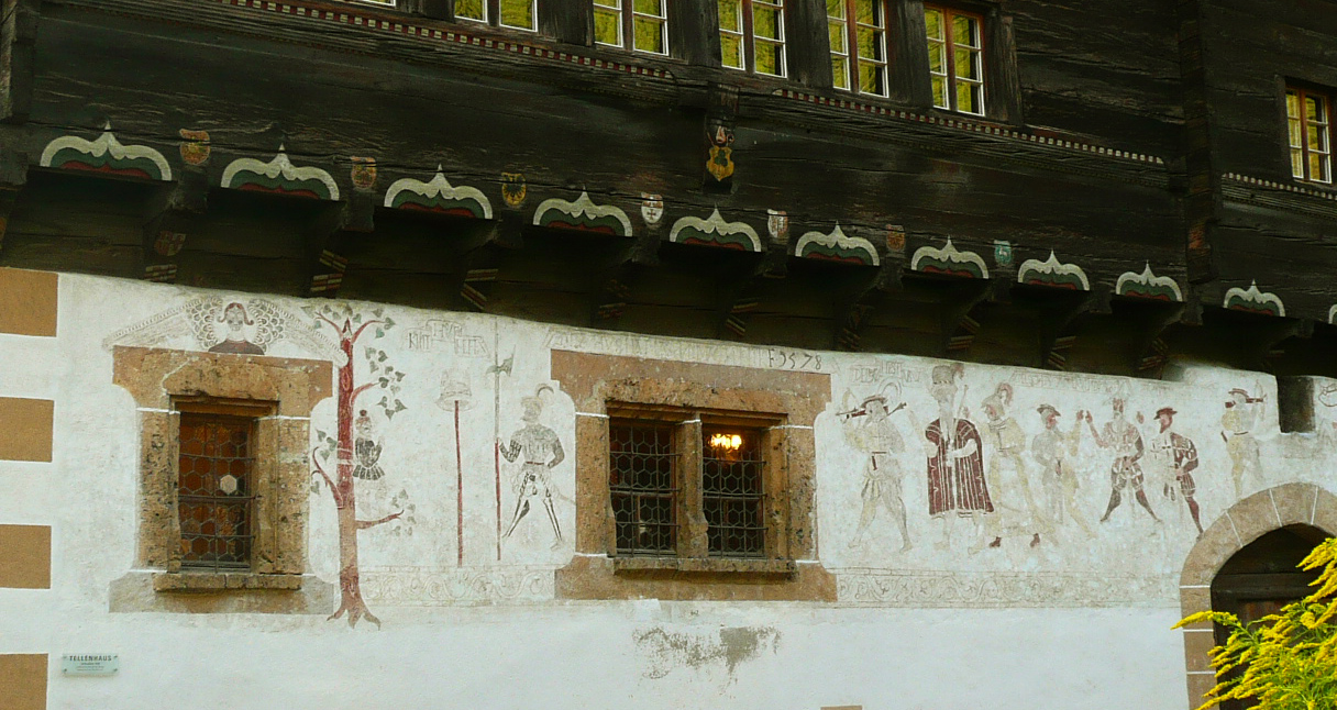 Fresques de la Tellenhaus datant de 1578